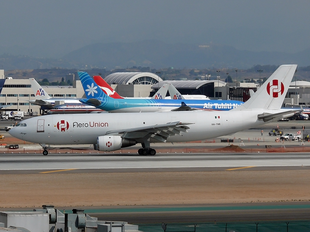 AeroUnión - Aerotransporte de Carga Unión Airbus A300B4-203(F)